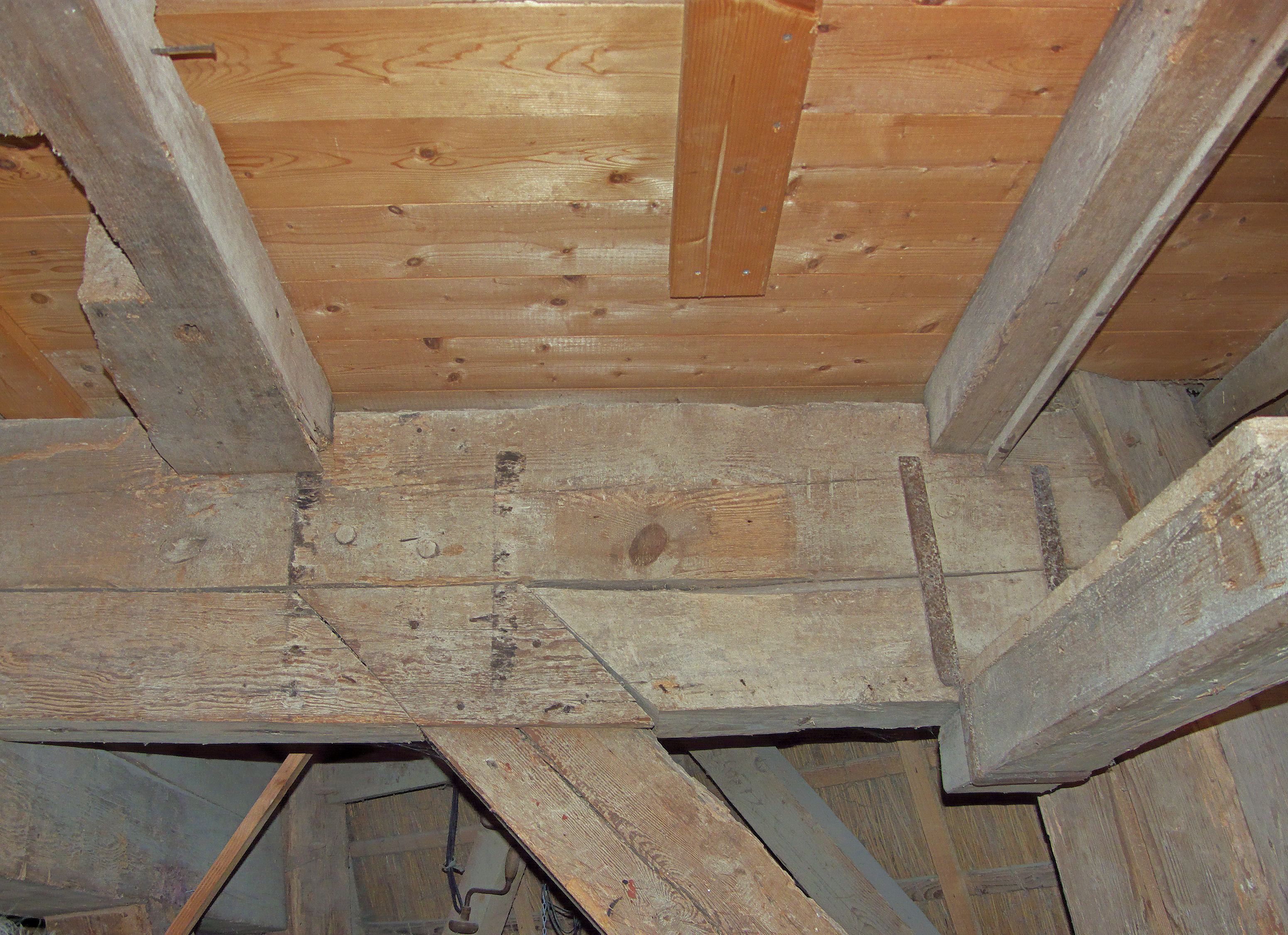 Zwiepse molen, plaats voormalig pelkoppel